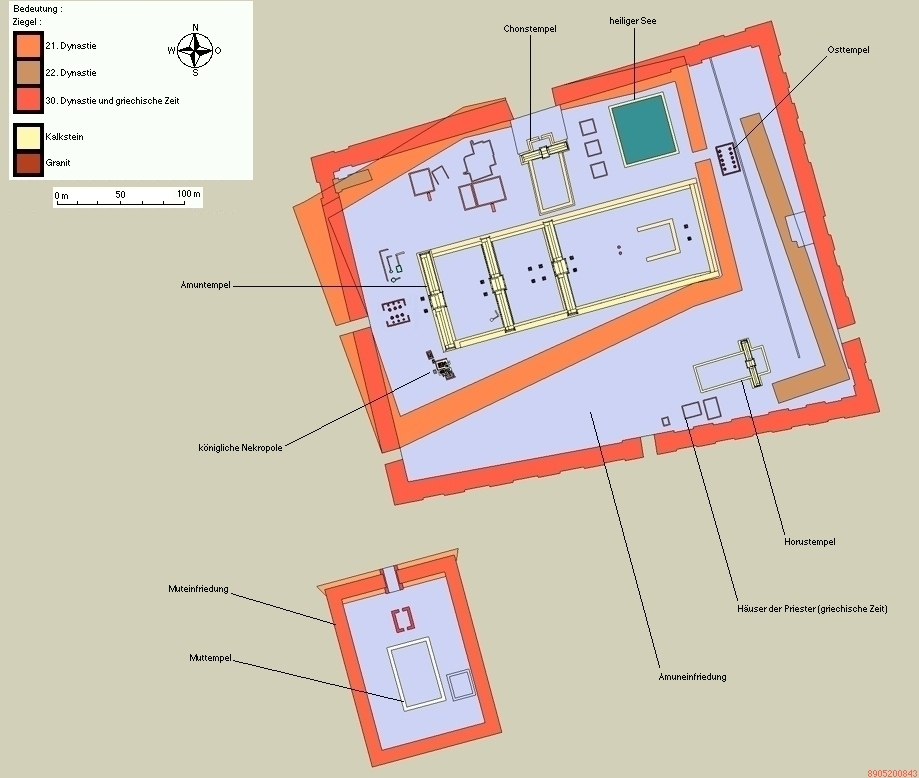 Plan von Tanis